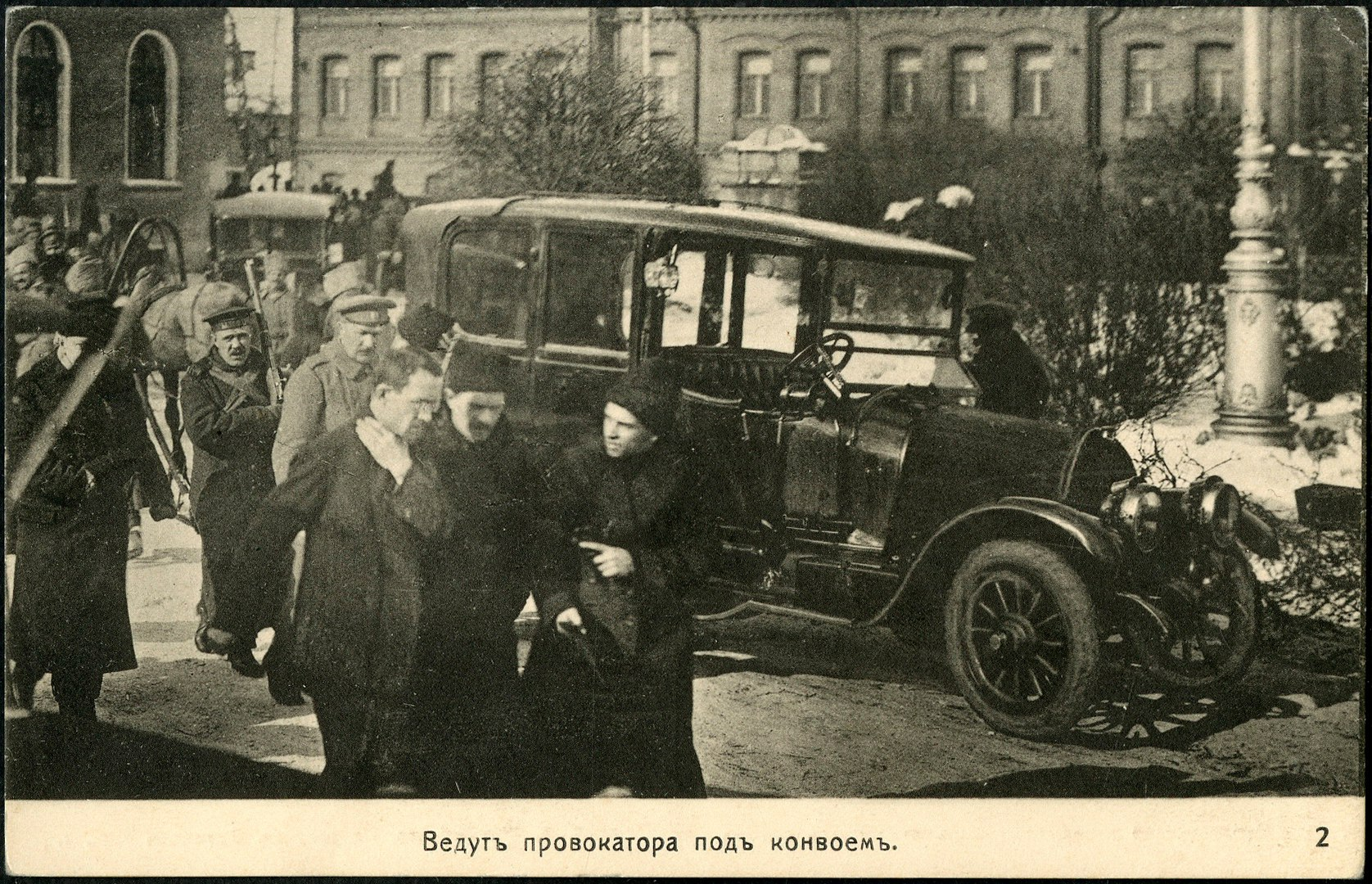 Ведут провокатора под конвоем. Петроград.